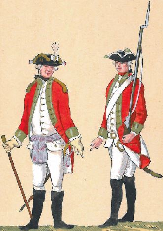 41. Regiment Pieszy (Czapskiego)